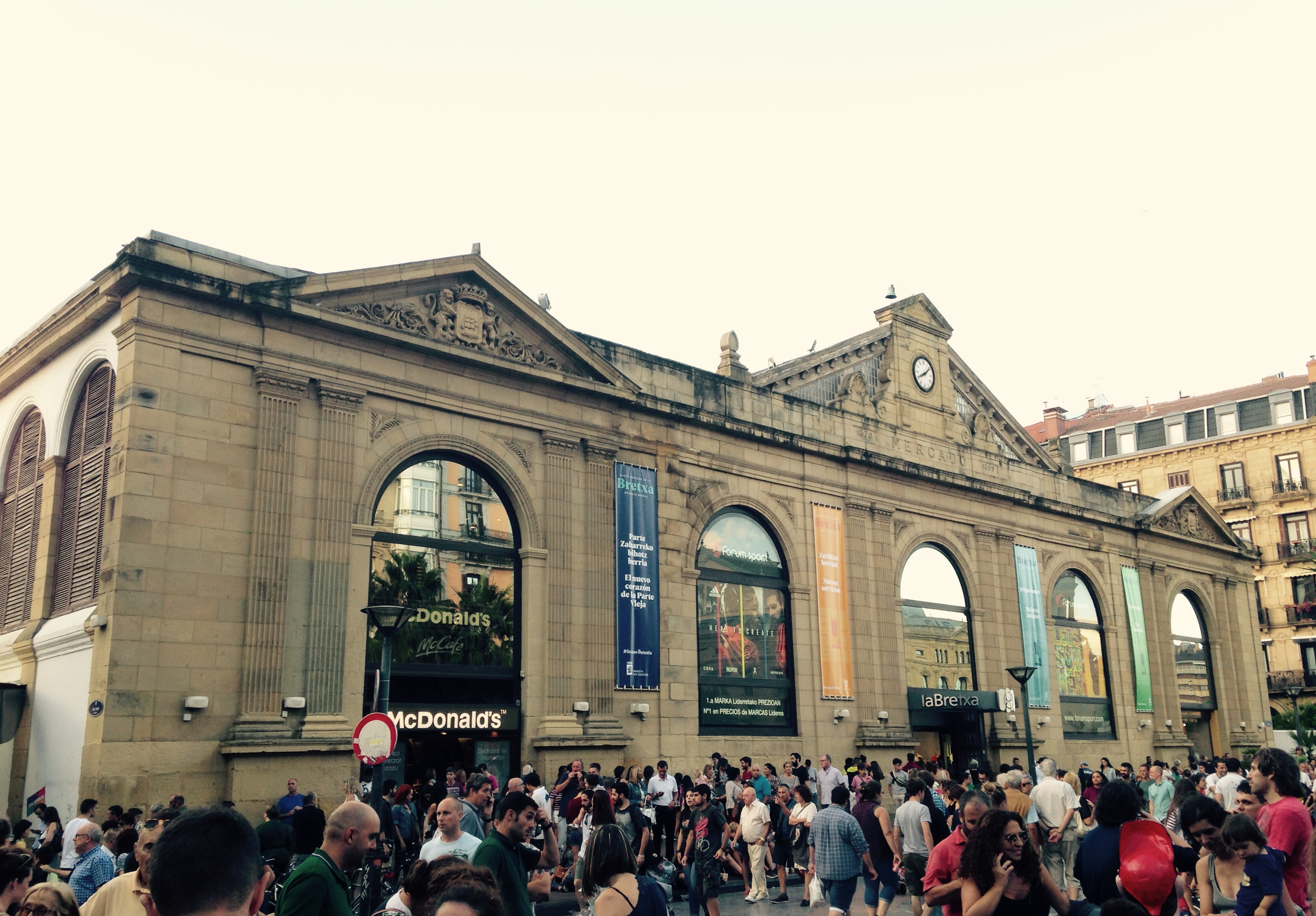 Bretxa merkatuaren fatxada nagusia, Boulevardean (Donostia, Gipuzkoa)